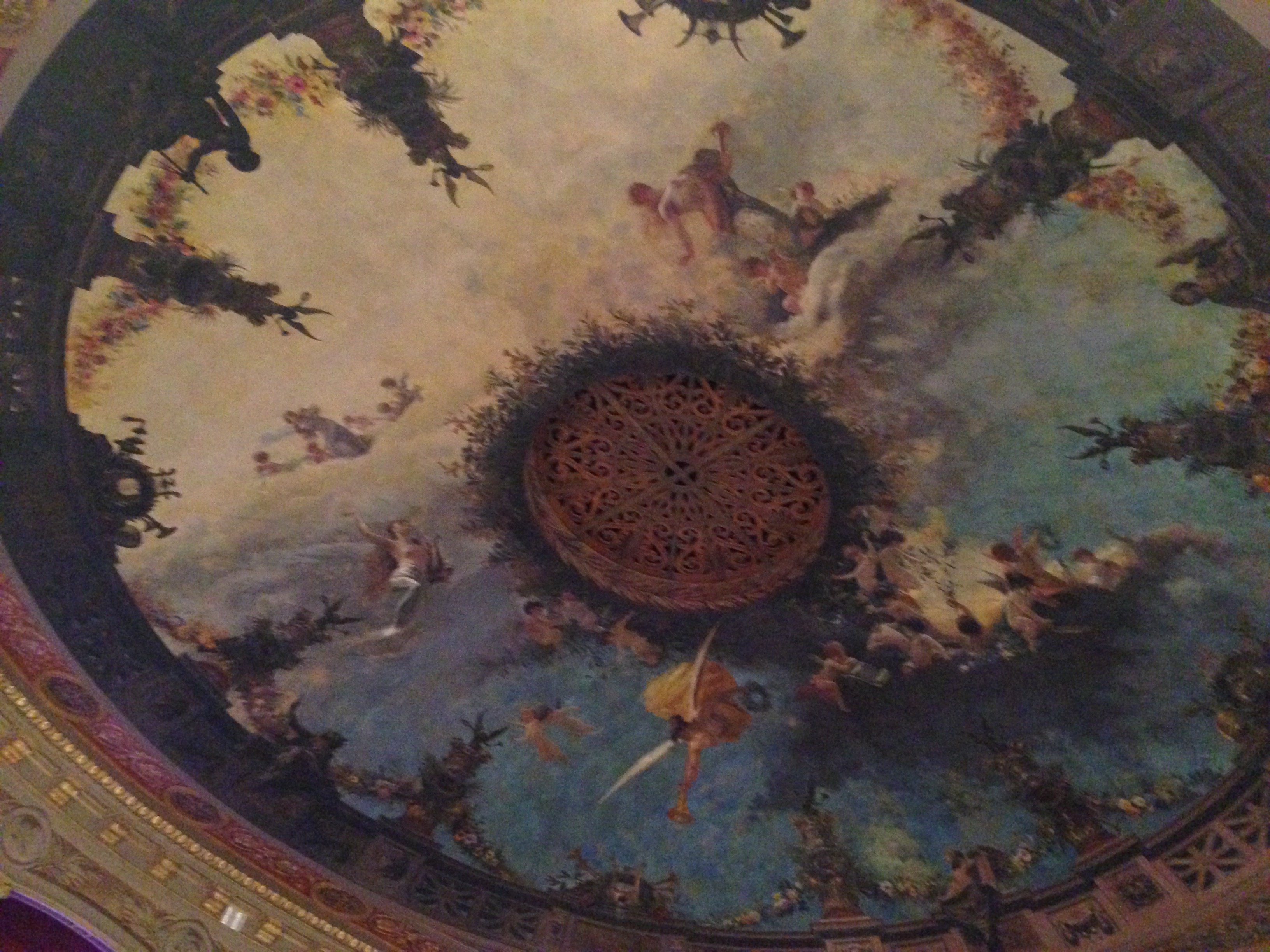 Volta del teatro Siracusa